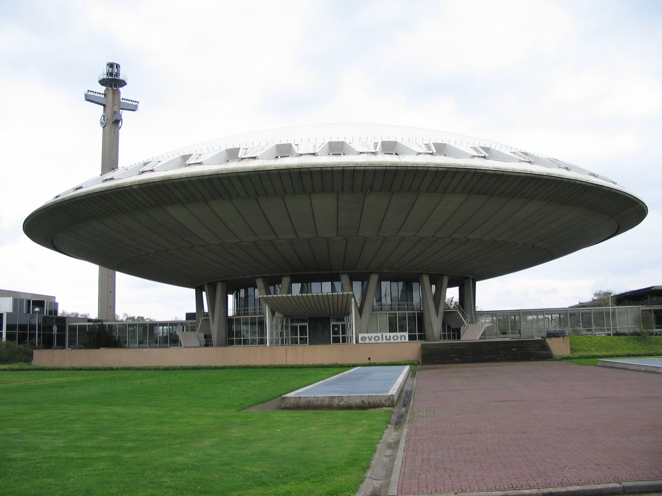 Evoluon, Eindhoven (Pays-Bas) -- Ouvert en 1966 à l'initiative de Frits Philips (1905-2005), ancien dirigeant du géant électronique batave, afin de célébrer les 75 ans de la firme, ce bâtiment futuriste est à l'origine un musée des sciences. Souffrant d'une concurrence de plus en plus forte, il ferme fin des années 1980. C'est aujourd'hui un centre de congrès.